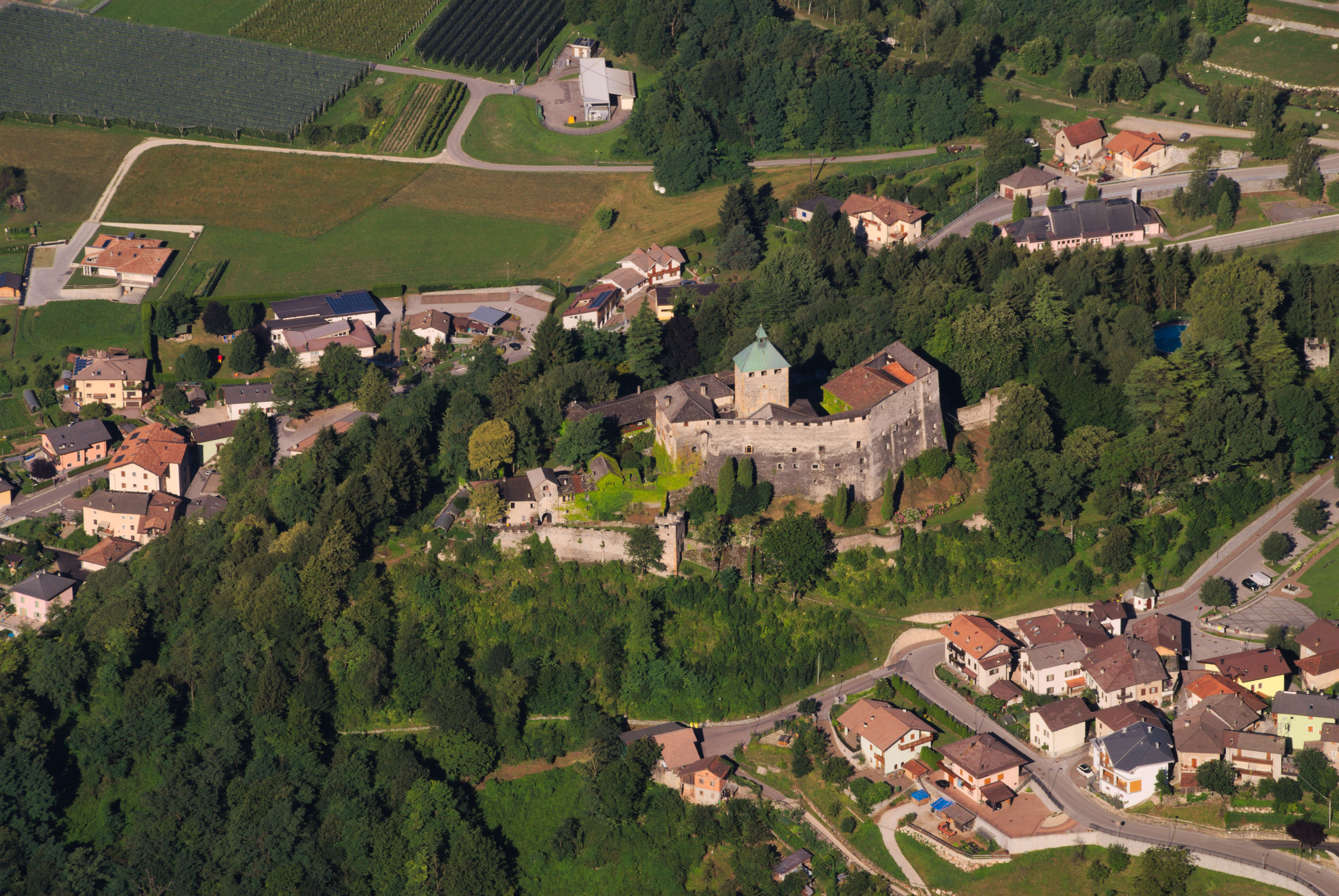 Castel Ivano visto da caposaldo militare Monte Lefre, seconda foto. This is a photo of a monument which is part of cultural heritage of Italy.